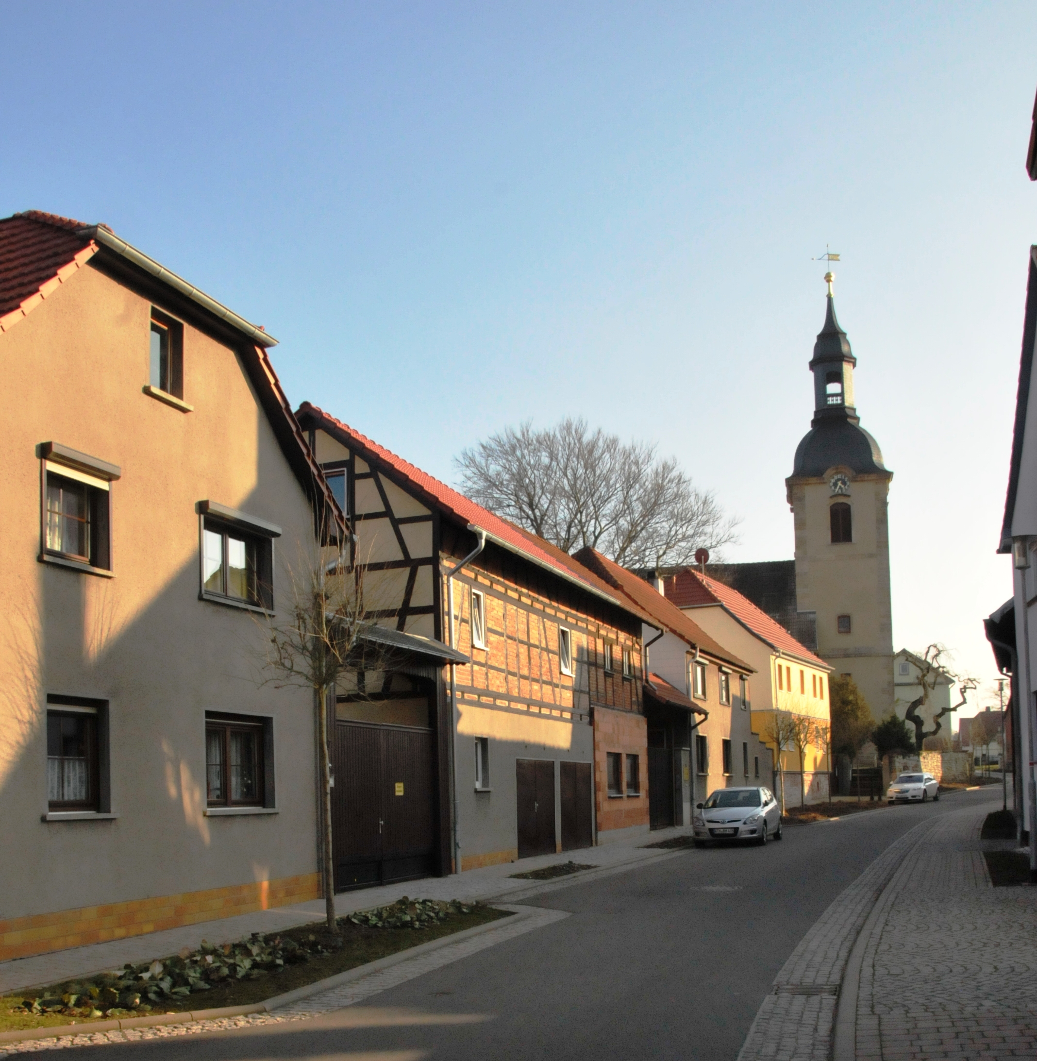 Ortsbild von Warza